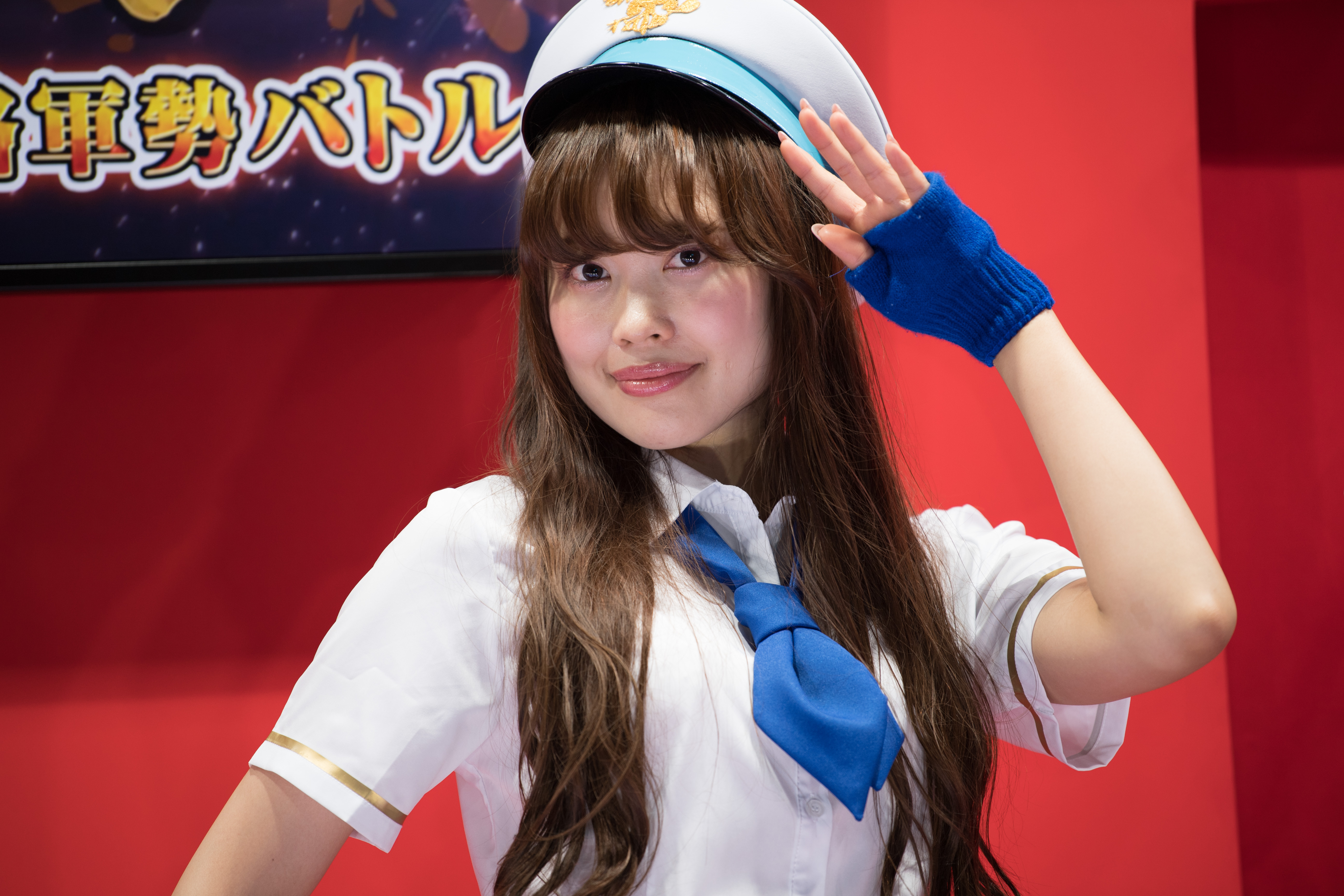 20170922-DSC_2054